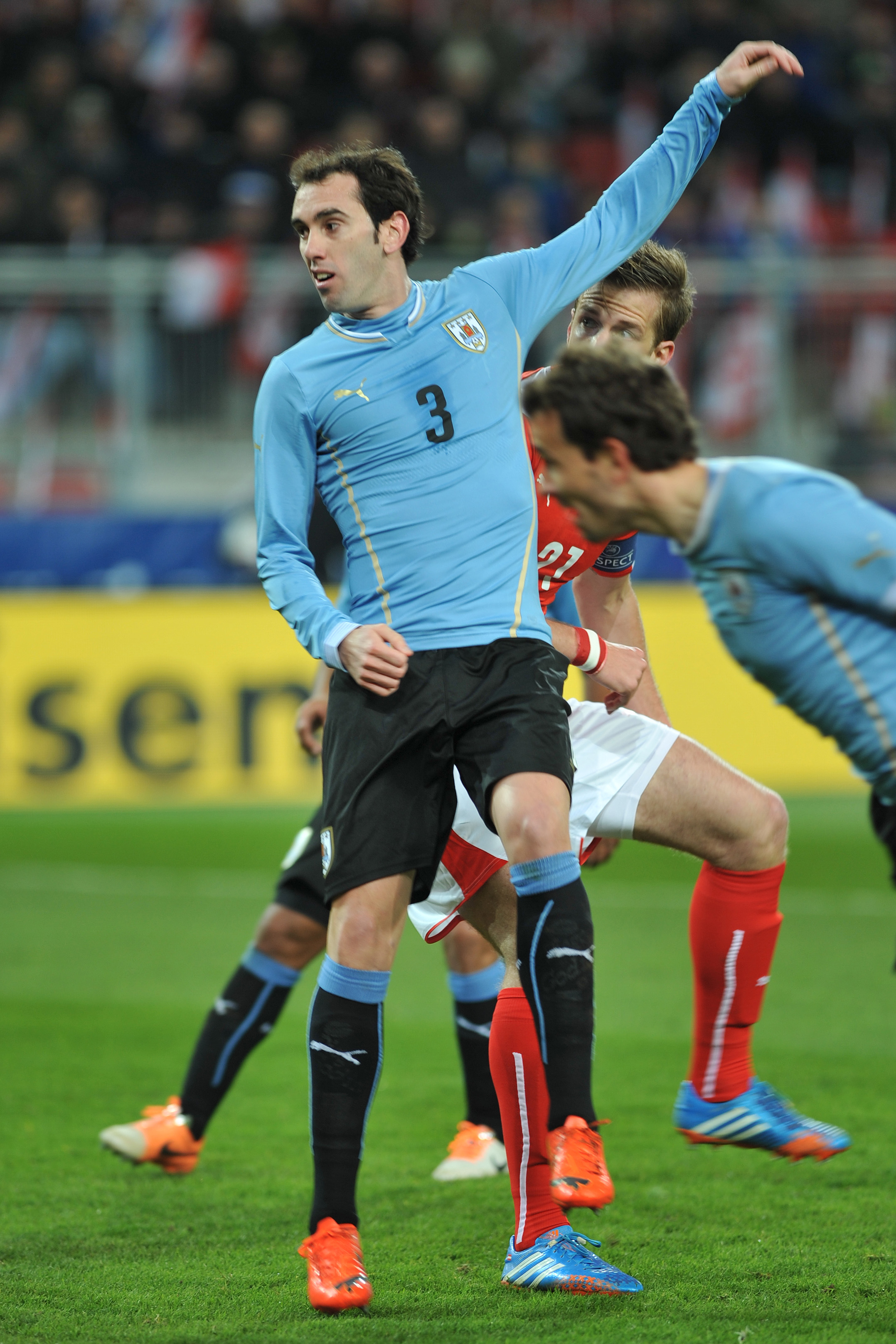 Freundschaftliches Länderspiel Österreich - Uruguay am 5. März 2014 in Klagenfurt: Diego Godín